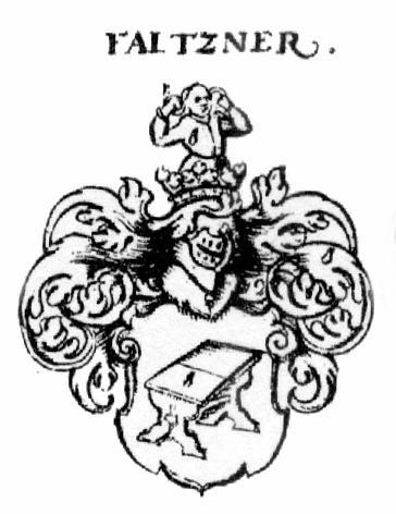 Wappen der Nürnberger Patrizierfamilie Valzner (Falzner)